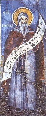 Cosmas of Maiuma/ Козьма Иерусалимский